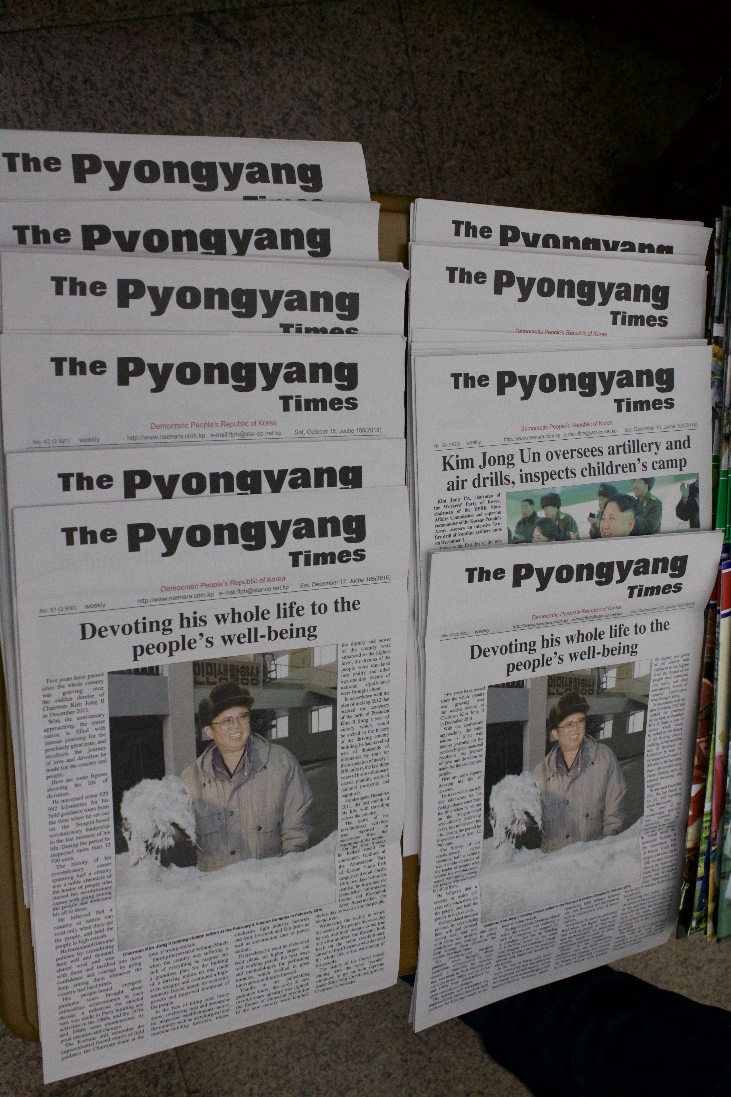 Pyongyang Timeses